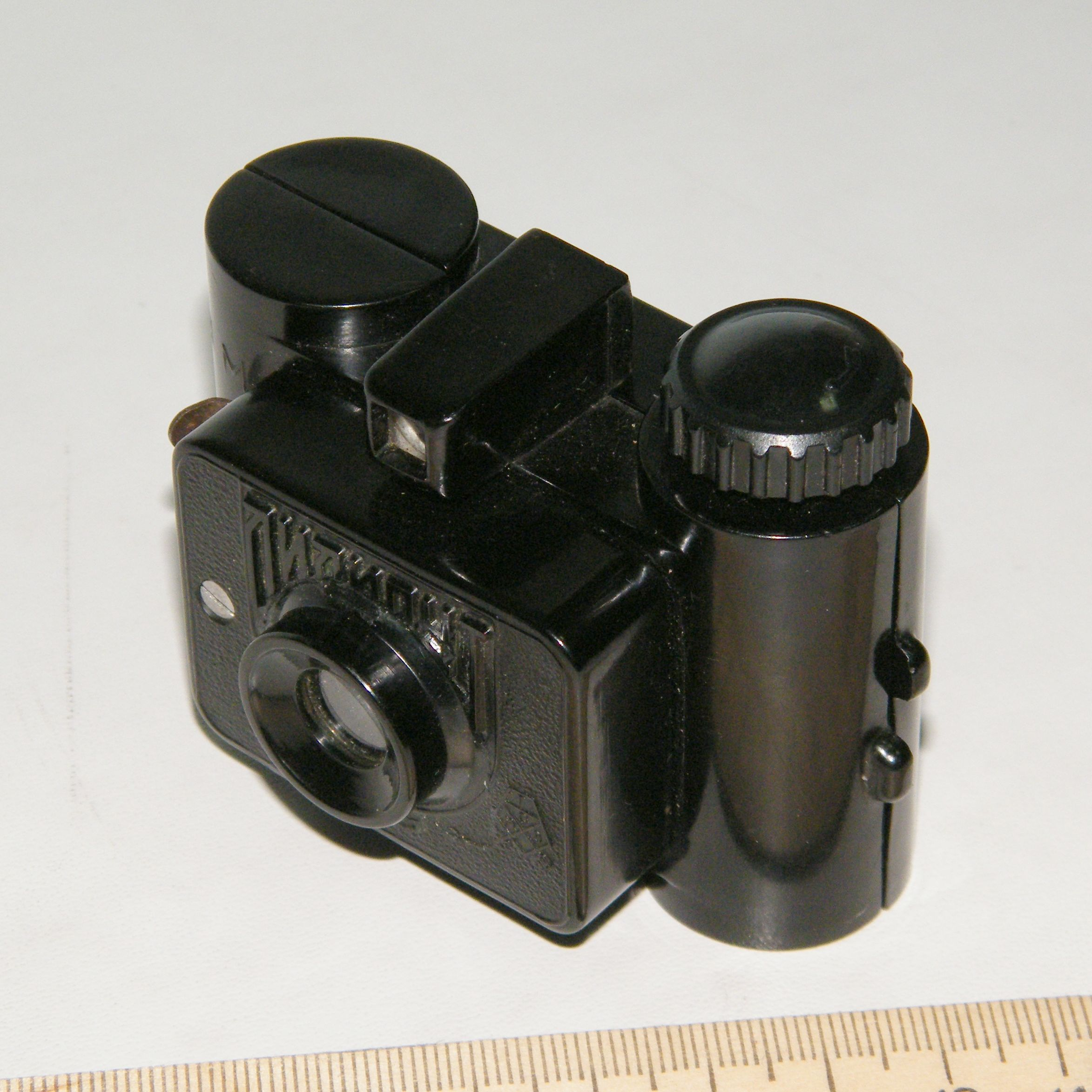 Фотоаппарат "Лилипут" (ГОМЗ, Ленинград), 1930-е годы.